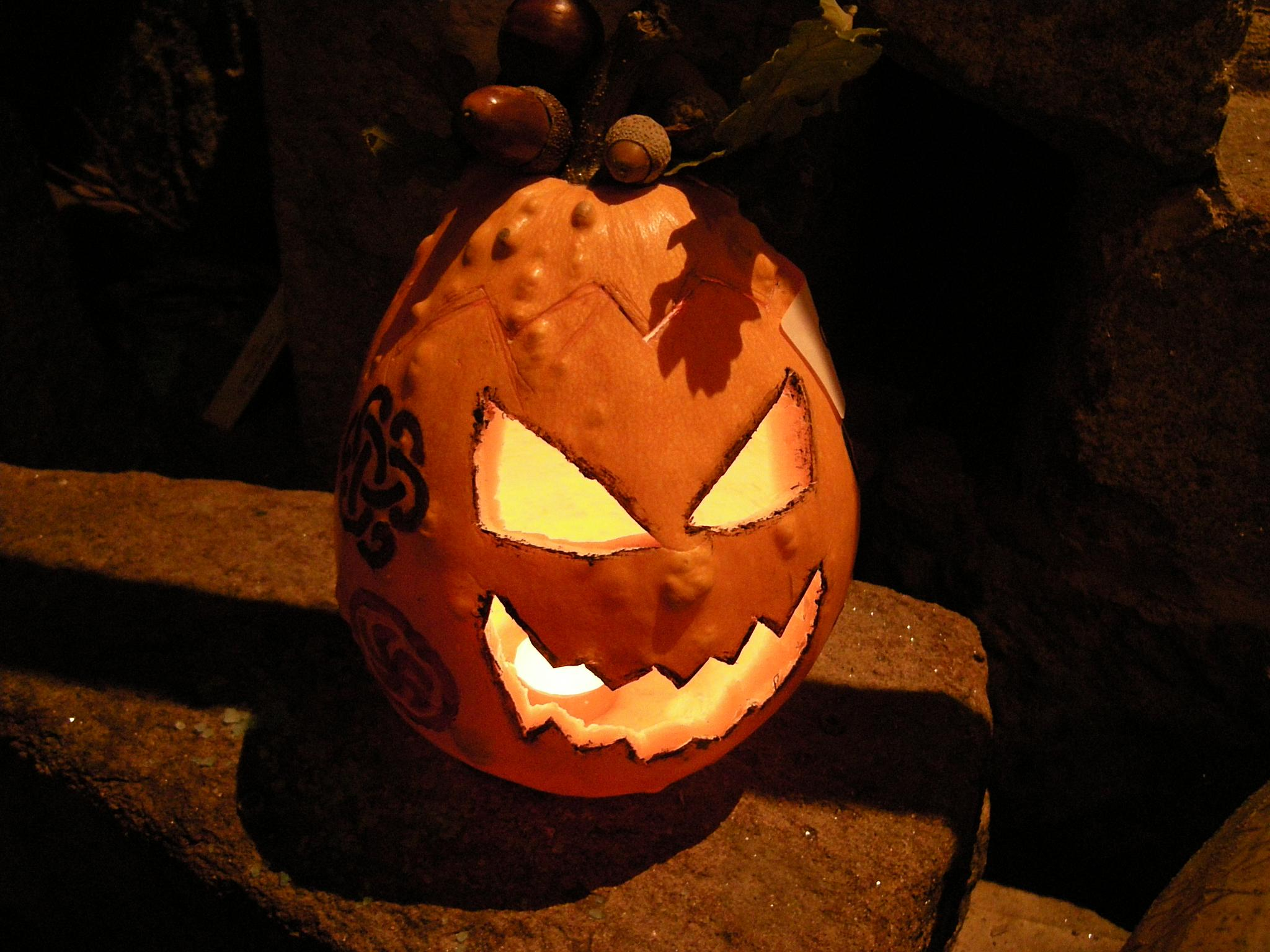 Concurso de calacús en el pub Casa dos Druidas. Calacú nº 74. Nuestra creación. Bueno, realmente fue creación de Ángeles.